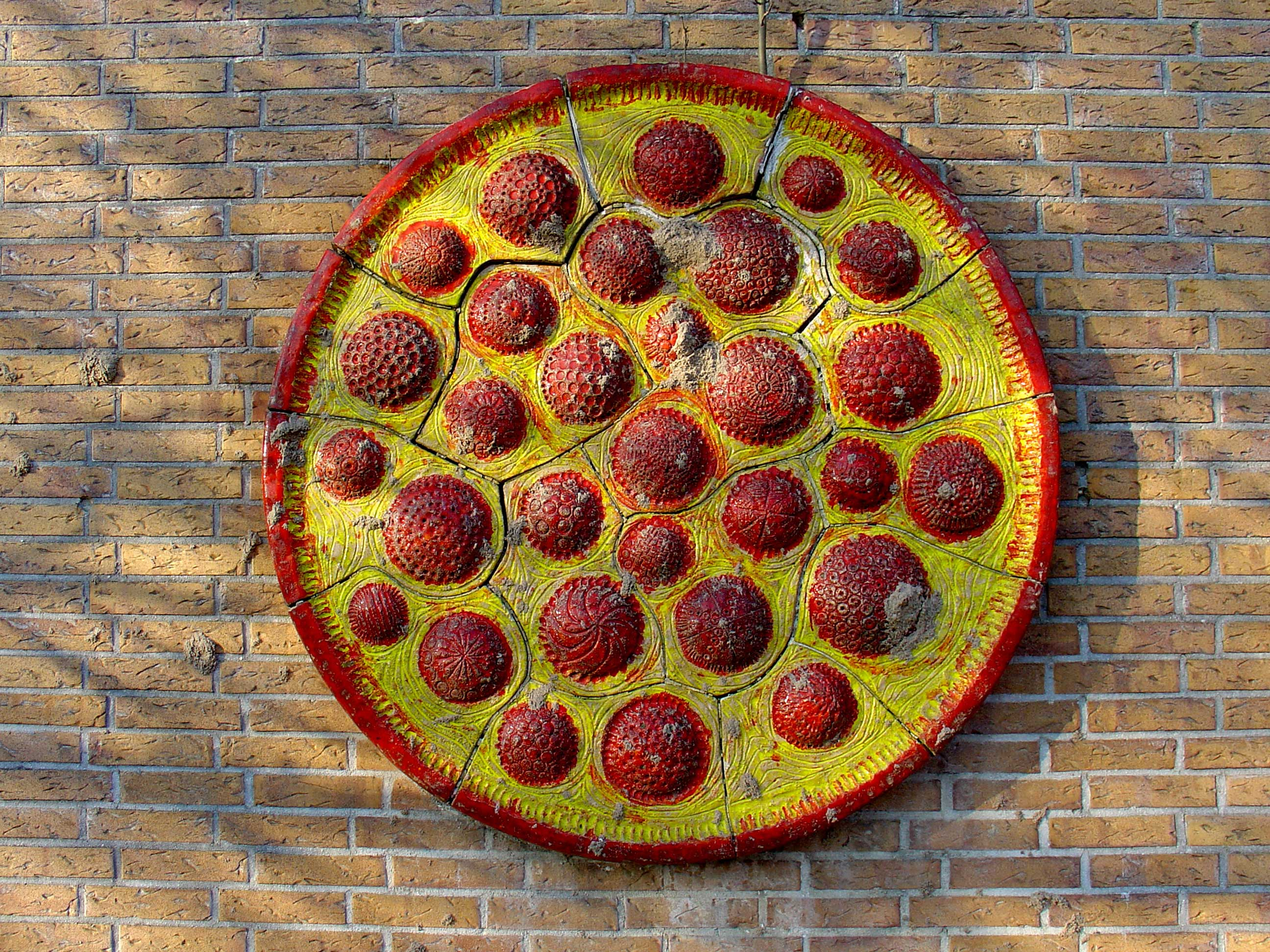 Living-stone 2 door Maarten Witte van Leeuwen - Livingstonelaan Gouda